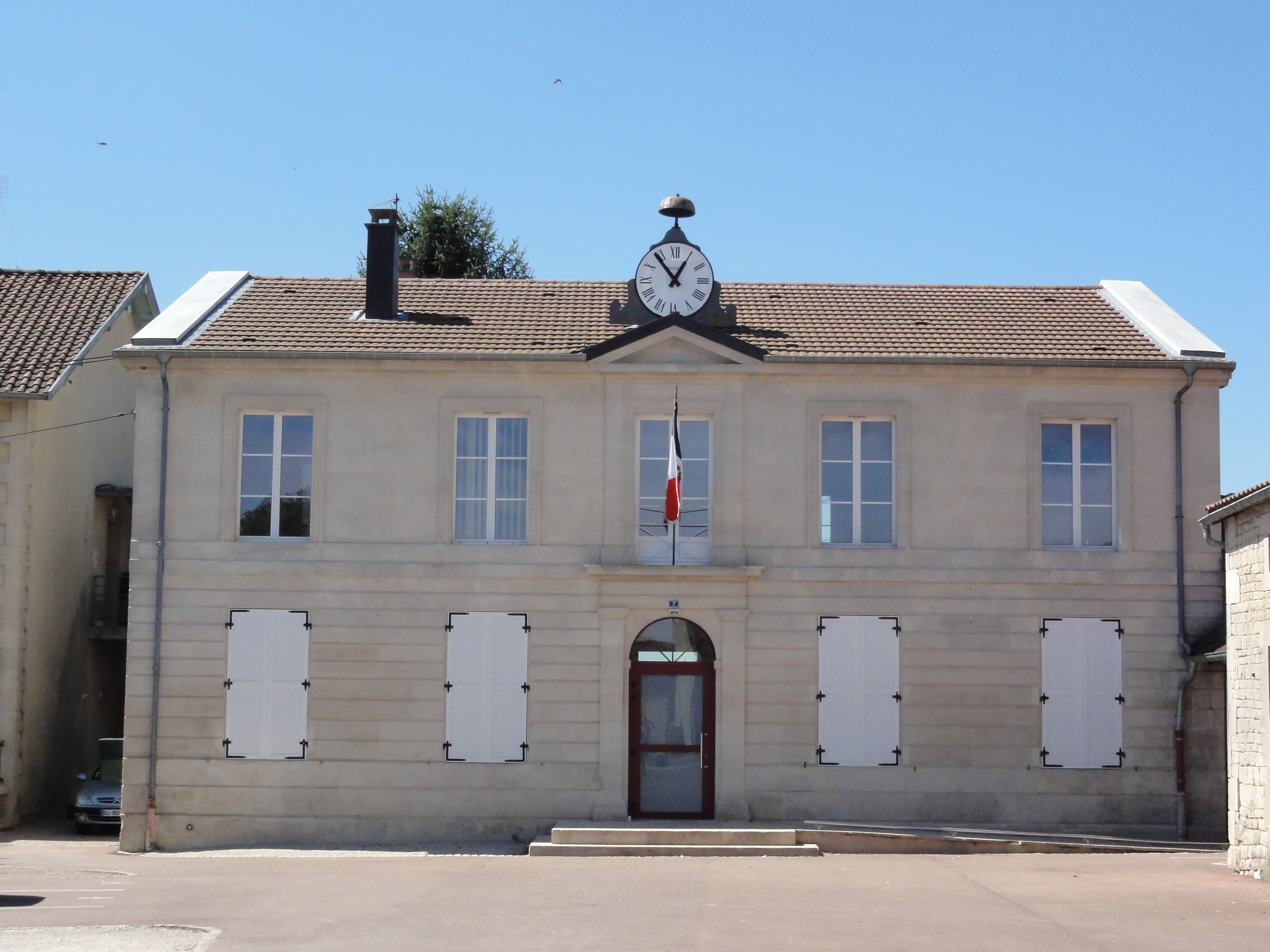 Savonnières-en-Perthois (Meuse) mairie